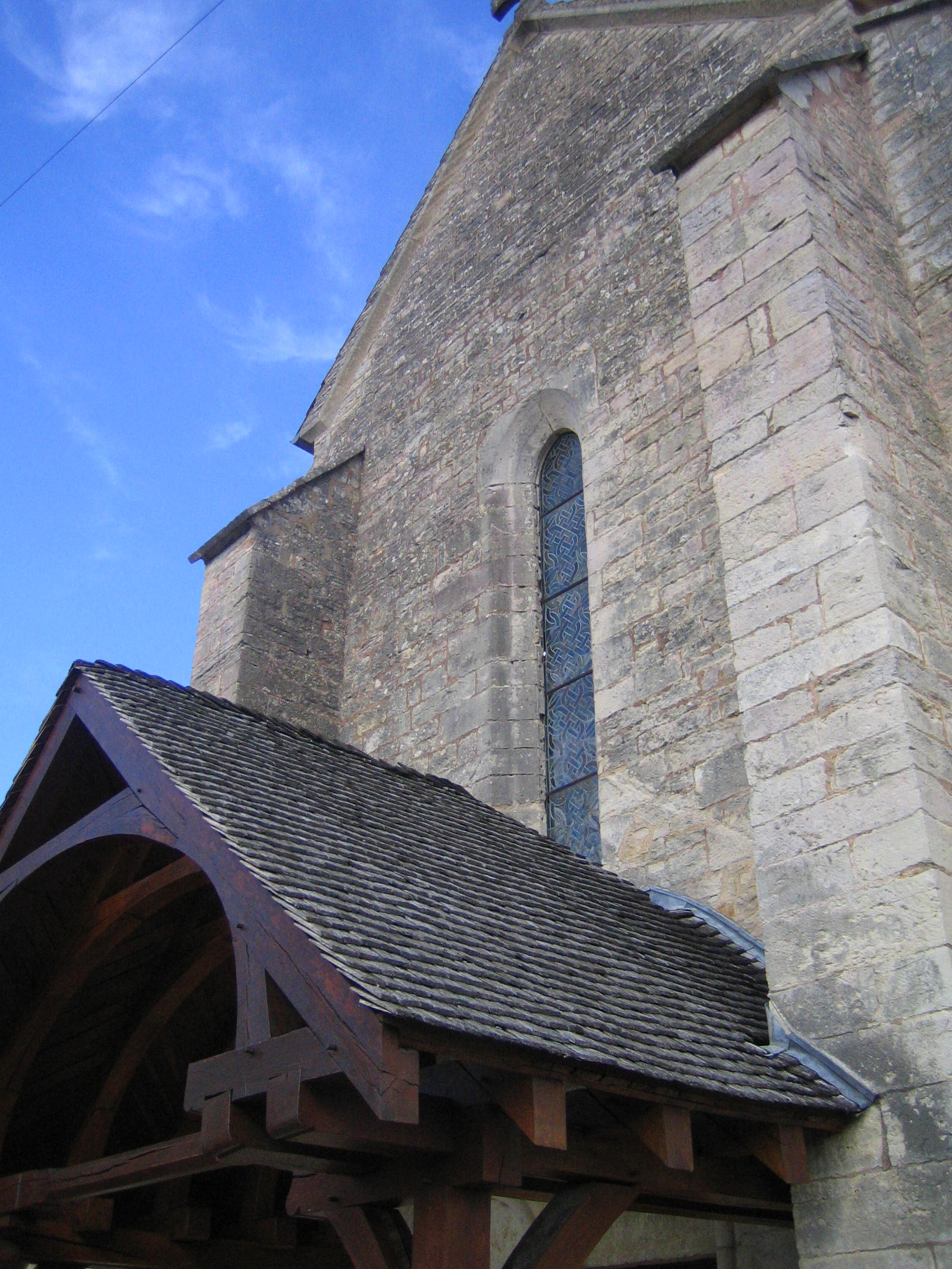 Fleurey-sur-Ouche (Côte-d'Or, France) - La façade ouest de l'église (avec toit du porche). Cette vue non recadrée fait apparaître sur son bord supérieur (au centre) l'extrémité d'un bras de la croix de pierre surmontant la façade, et écrasée par la perspective.